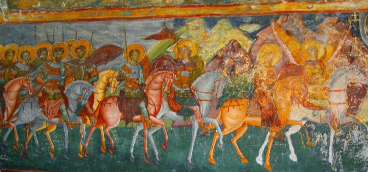 Император Константин со святыми вио нами следуют за архангелом Михаилом. Фреска церкви святого Креста в Пэтрэуци (Румыния)